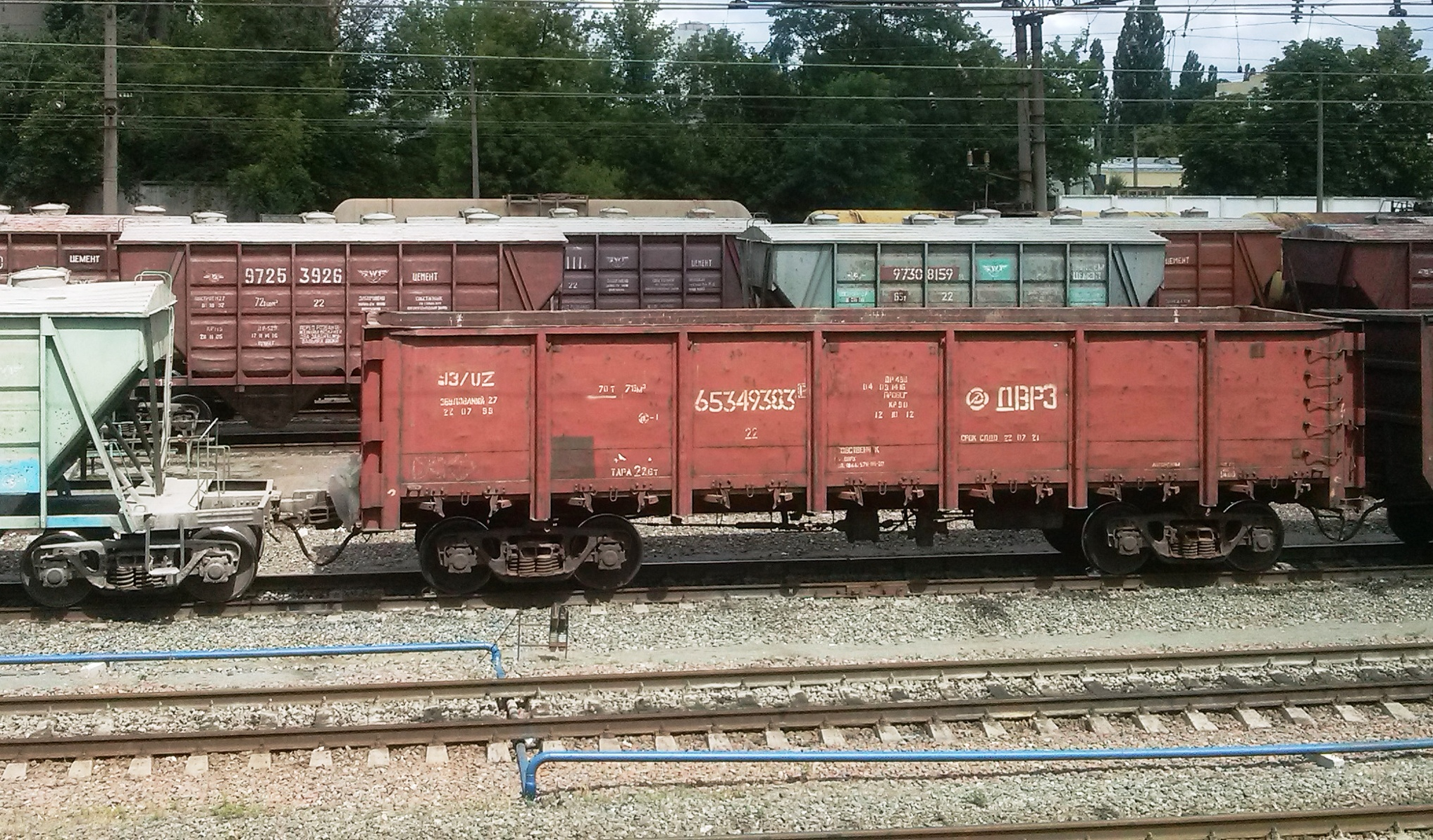 Полувагон в сцепке с хоппером